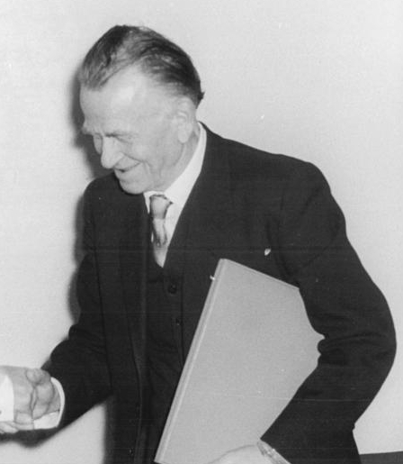 Berlin, Otto Dix-Ausstellung Zentralbild Zimontkowski 12.65.2032 Otto Dix-Ausstellung in Berlin. Die Deutsche Akademie der Künste zu Berlin eröffnet am 12.4.1957 in ihren Räumen eine eindrucksvolle und interessante Kollektivausstellung ihres Mitgliedes, des deutschen Malers Prof. Otto Dix. UBz: Der Präsident der Deutschen Akademie der Künste, Prof. Otto Nagel (links), überreichte am Tage der Eröffnung der Ausstellung Prof. Otto Dix die Ernennungsurkunde zum Korrespondierenden Mitglied der Deutschen Akademie der Künste. Abgebildete Personen: Nagel, Otto Prof.: Maler, Präsident der Akademie der Künste (AdK), Nationalpreisträger, Vaterländischer Verdienstorden (VVO) in Gold, DDR (PND 118586300)